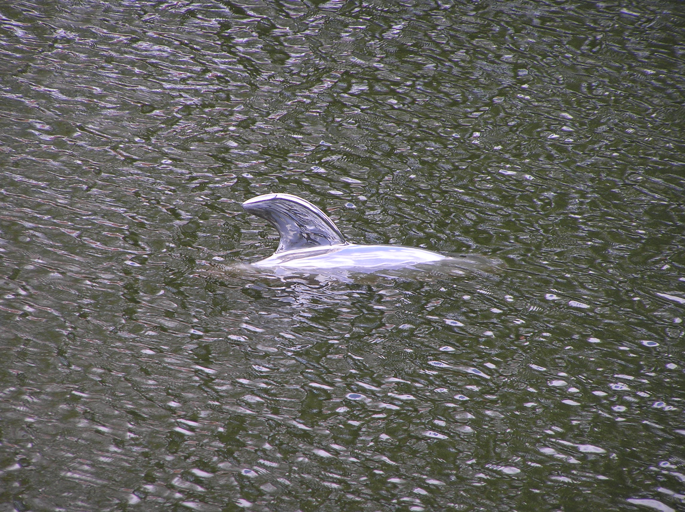 "Dolfijn" door Wilco Traas. Kunstwerk in de Veste (singel) van Goes ter hoogte van de Jacob Valckestraat.